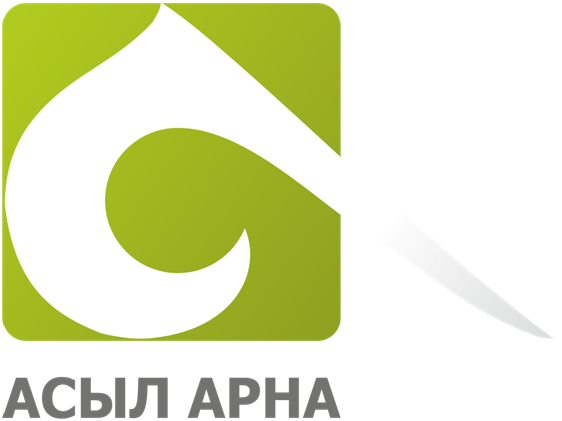 Екінші логотип